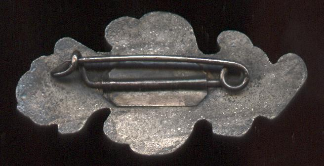 Souville Abzeichen, RIR 81, Rückseite ohne Hersteller